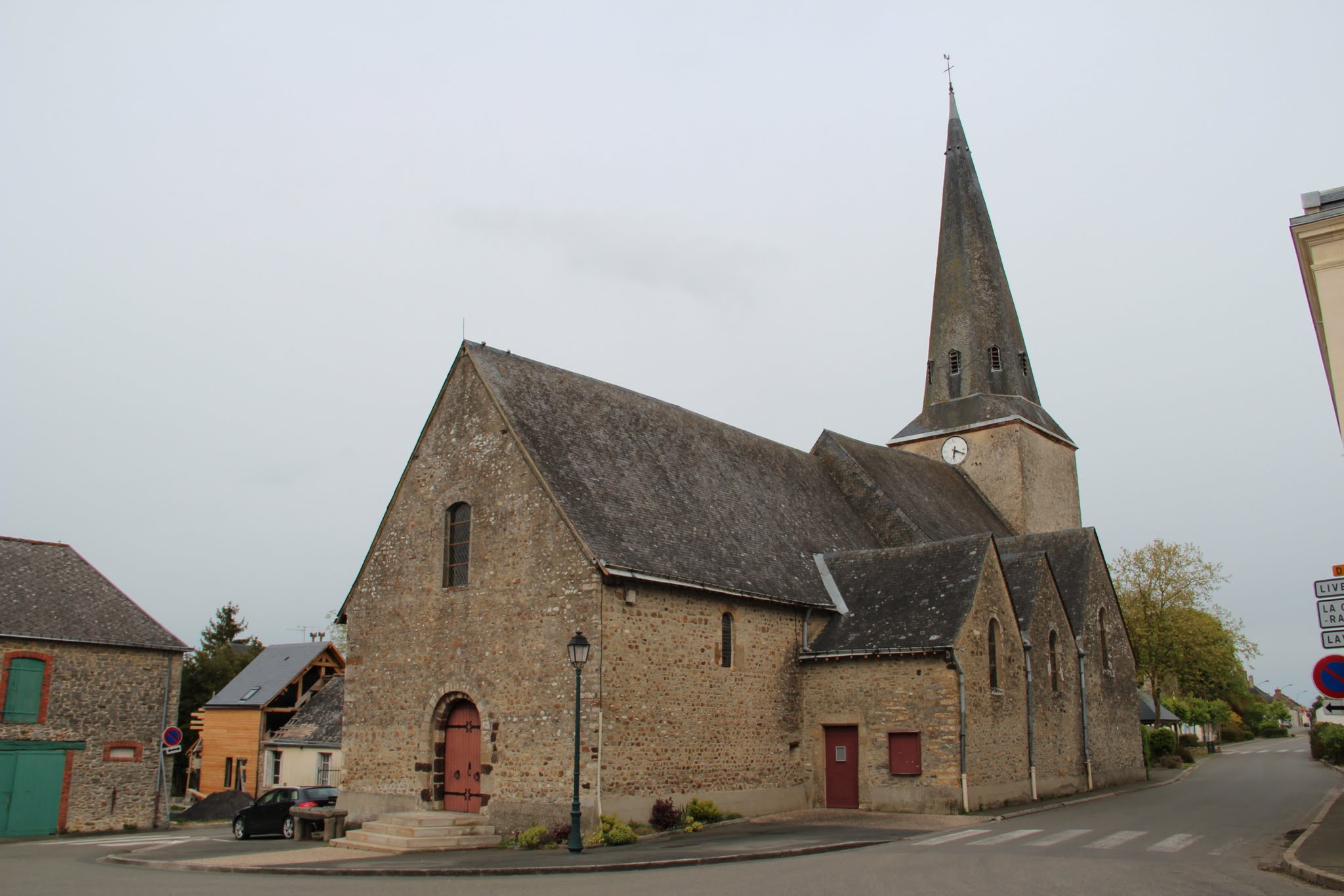 Eglise Paroissiale Saint-Christophe